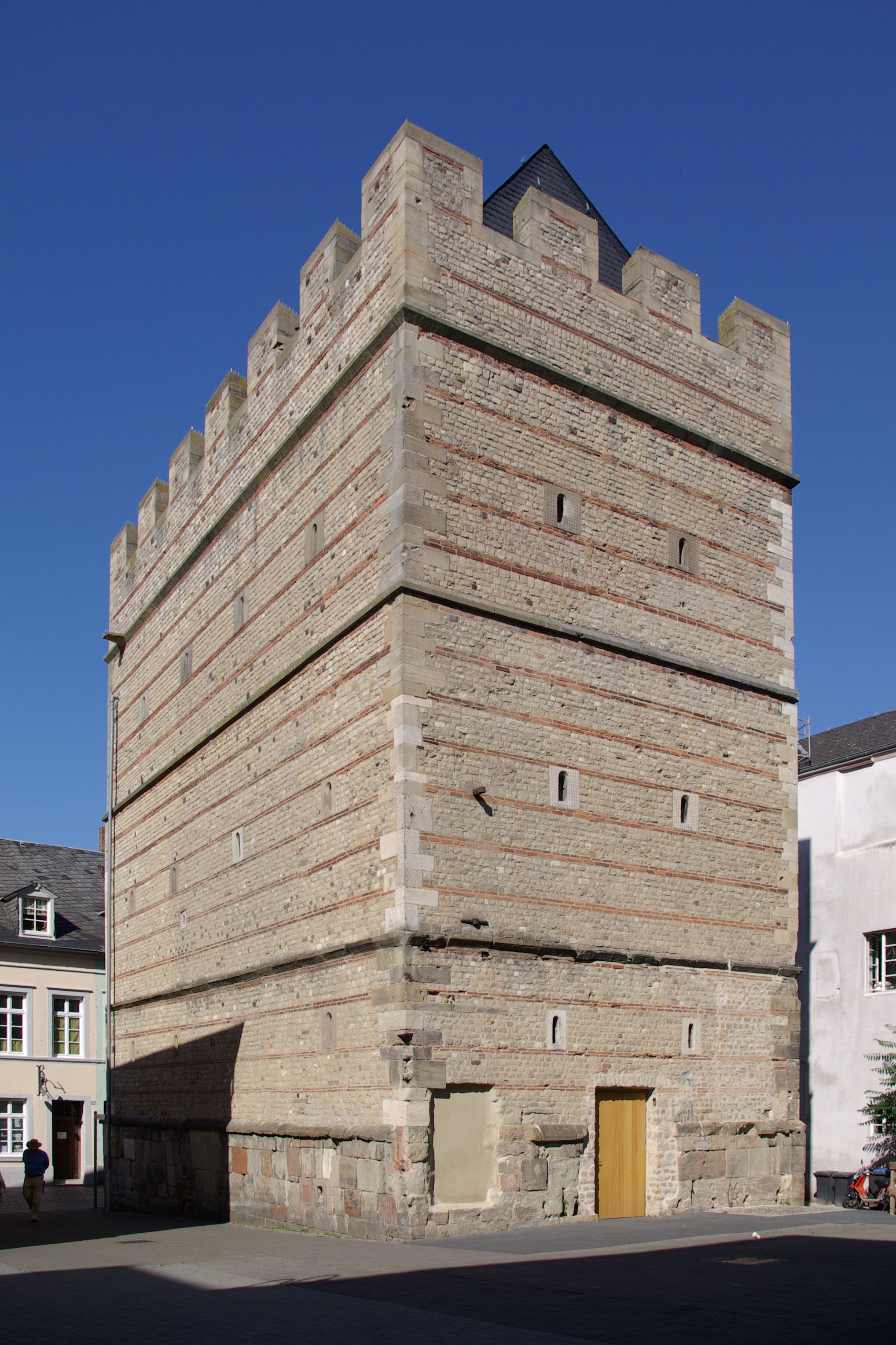 Trier, sogenannter Frankenturm, romanischer Turmbau, um 1100, Quadersockel teilweise Römisch